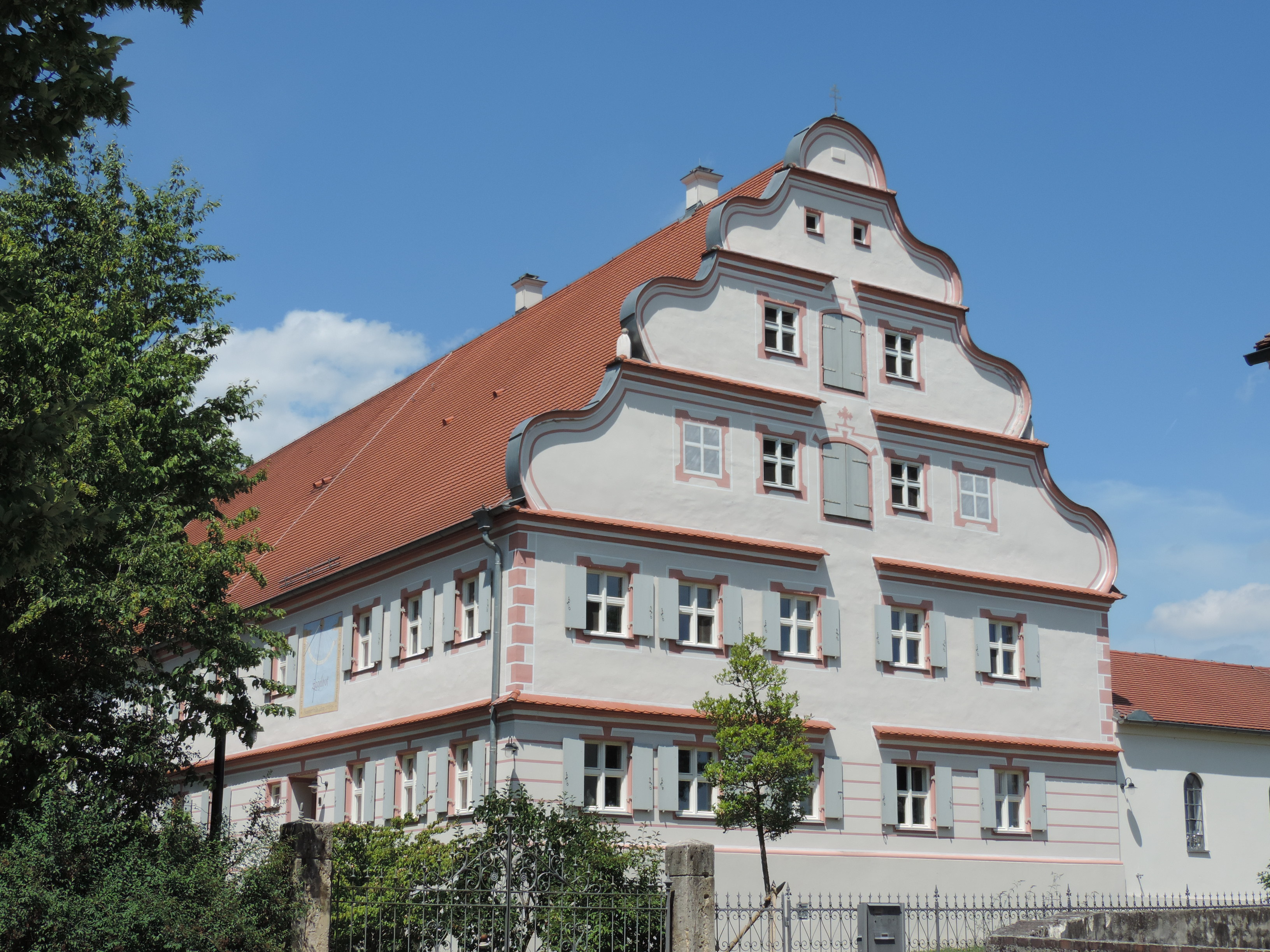 Gutshof von Eggelhof